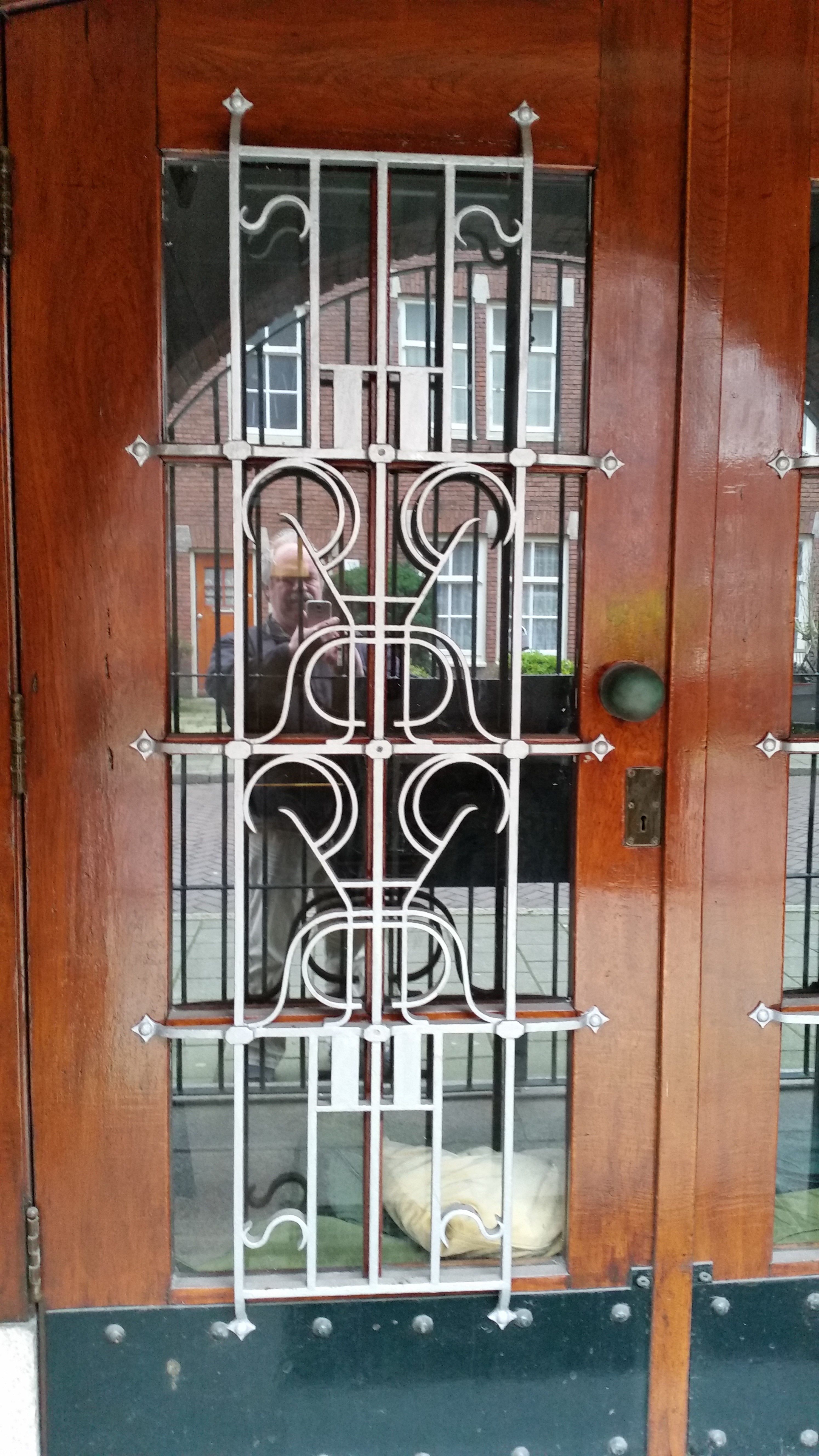 Impressie Linnaeushof 47-48 Amsterdam (februari 2020)